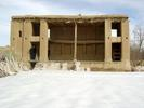 حسینیه دماب ساخته شده در 1266 ق